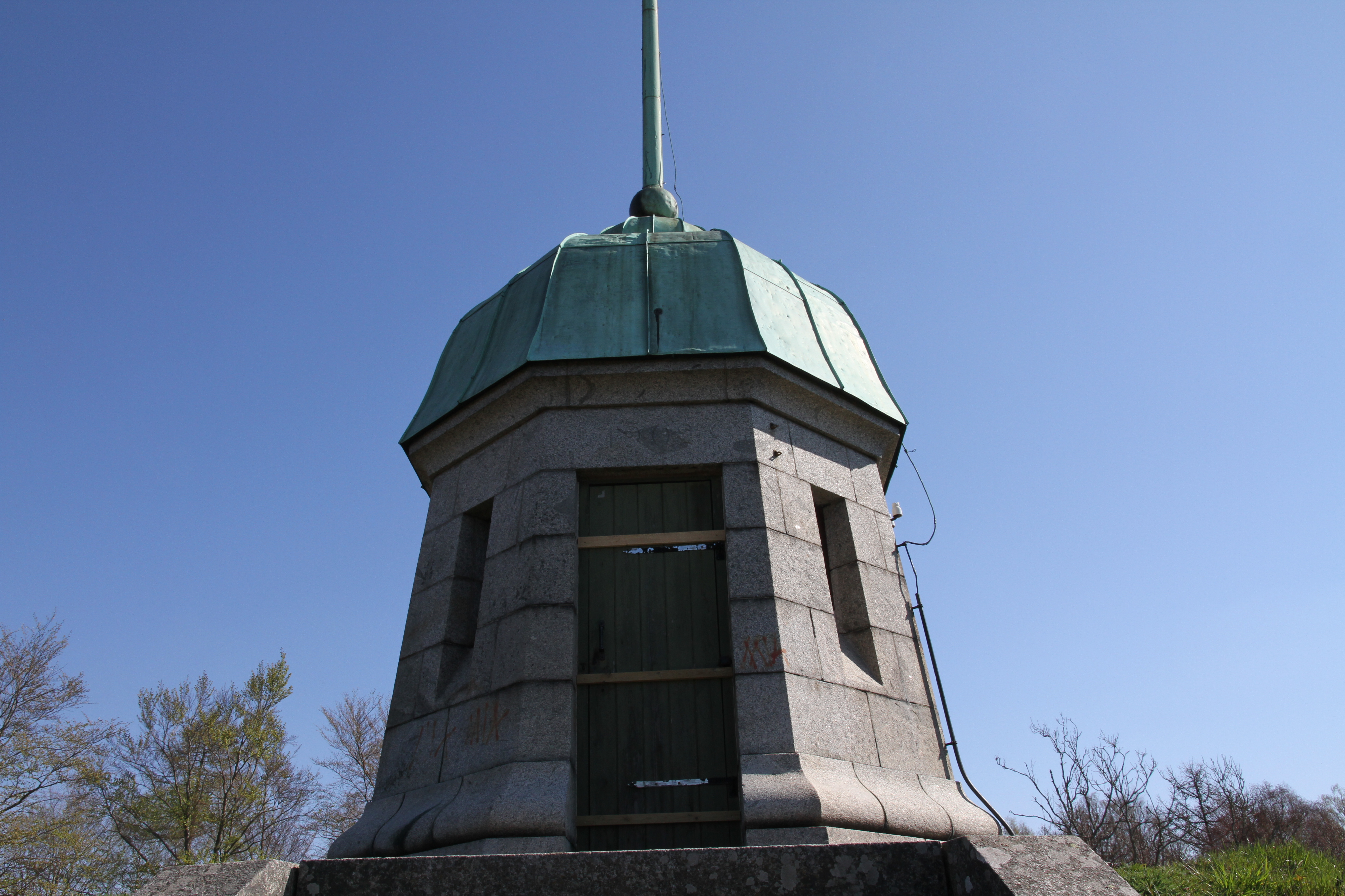 Karlshamns gamla vattentorn